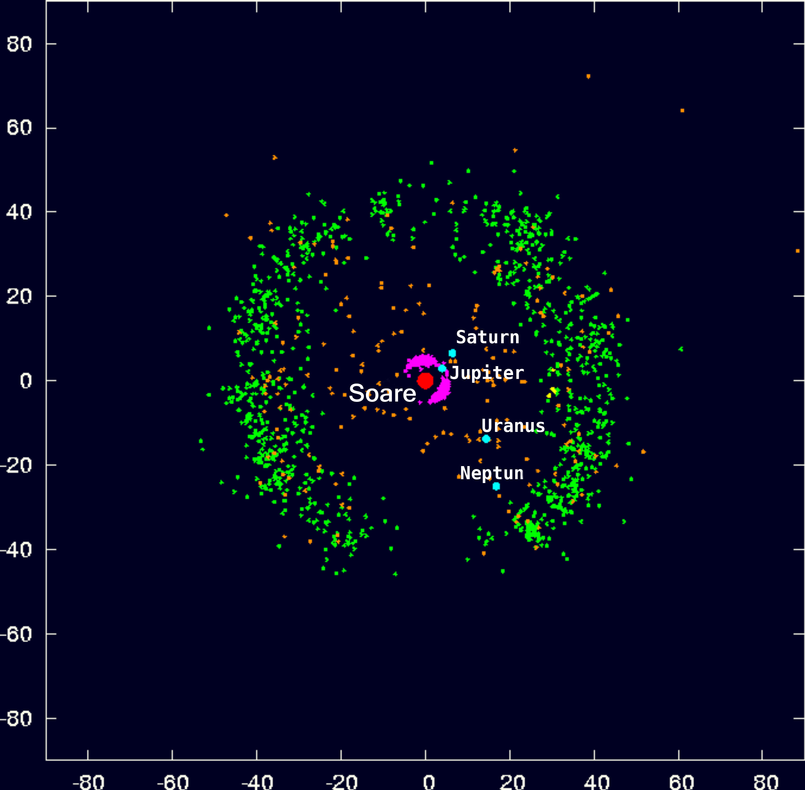 Legendă Roșu = Soarele Acvamarin = Gigant gazos Verde = Obiect din centura Kuiper Oranj = Obiect din discul împrăștiat sau Centaur Roz = Troian a lui Jupiter Galben = Troian a lui Neptun